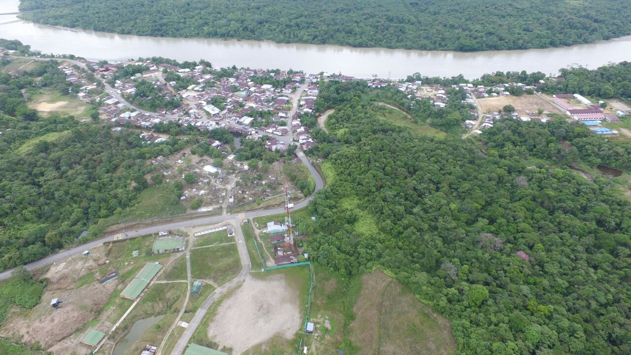 Yuto, Atrato, Chocó, Colombia